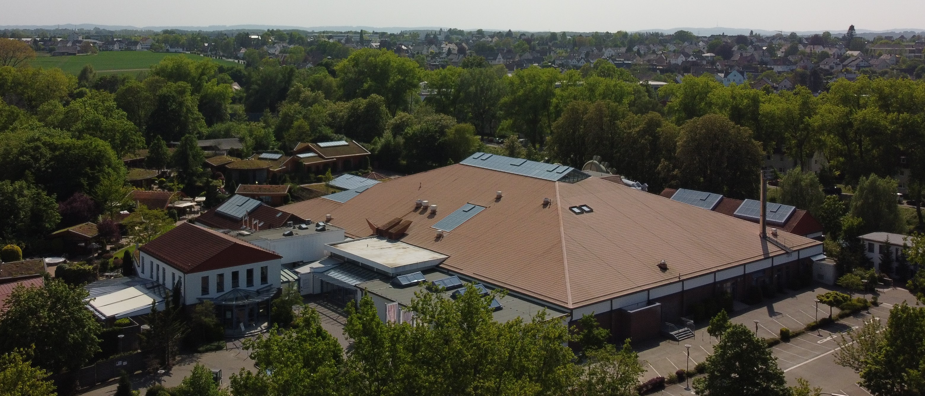 H2O Herford Luftbild vom Parkplatz aus aufgenommen